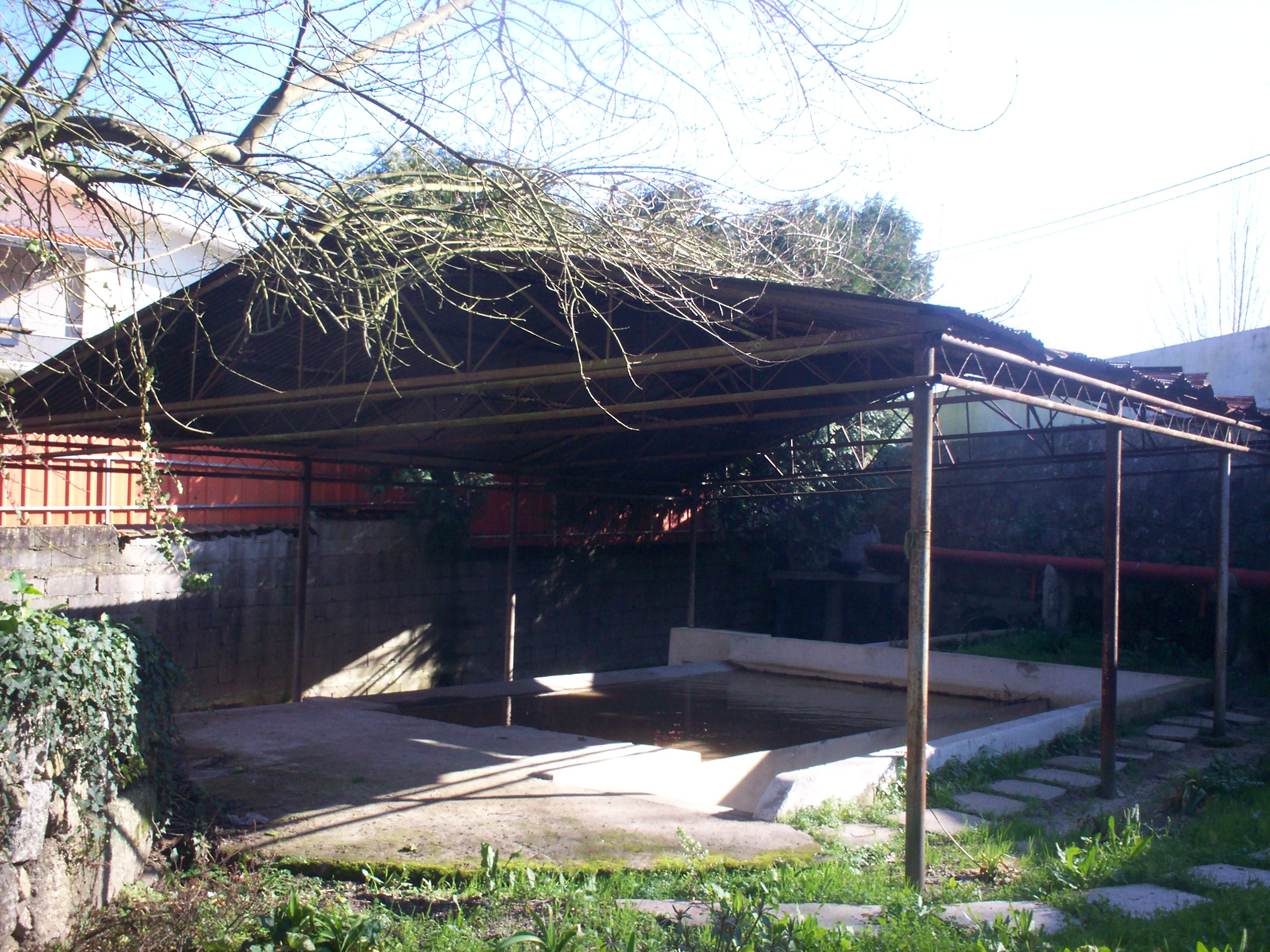 Ribeiro em Riba de Ave, Famalicão